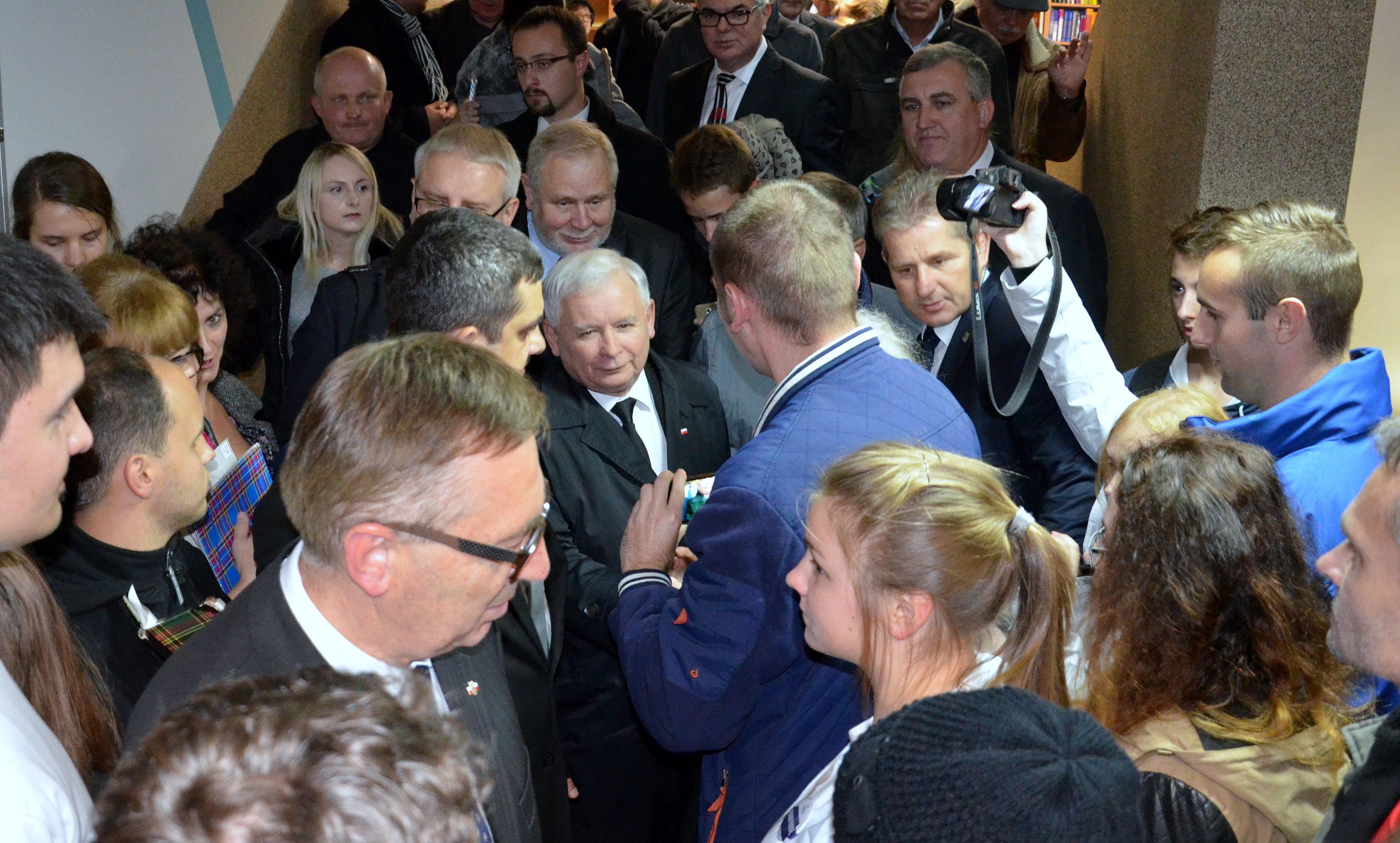 Die Parlamentswahl in Polen 2015